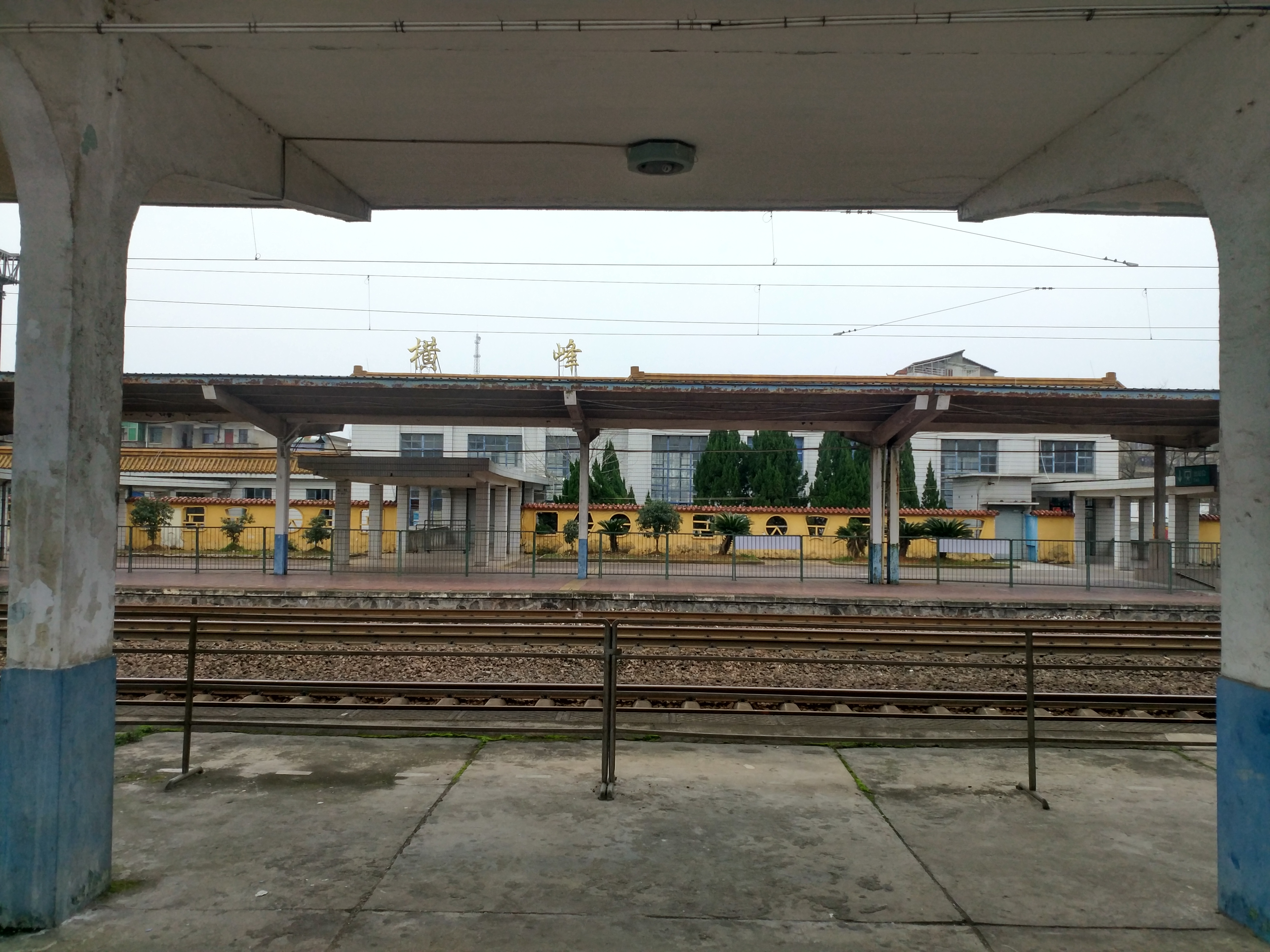 横峰火车站